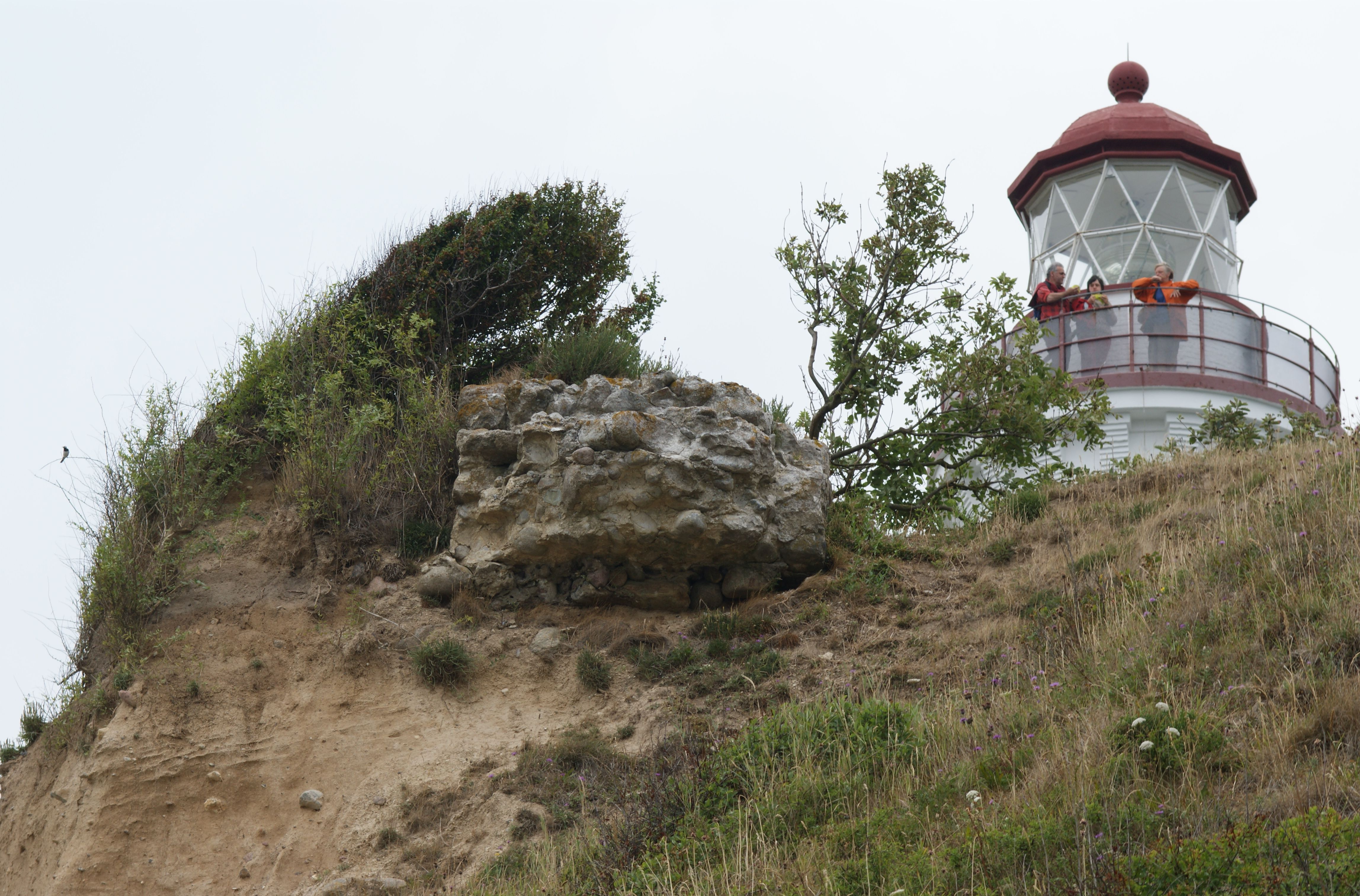 Vesborg Fyr - rester af murværk fra Wisborg - remnants of masonry from the castle Wisborg